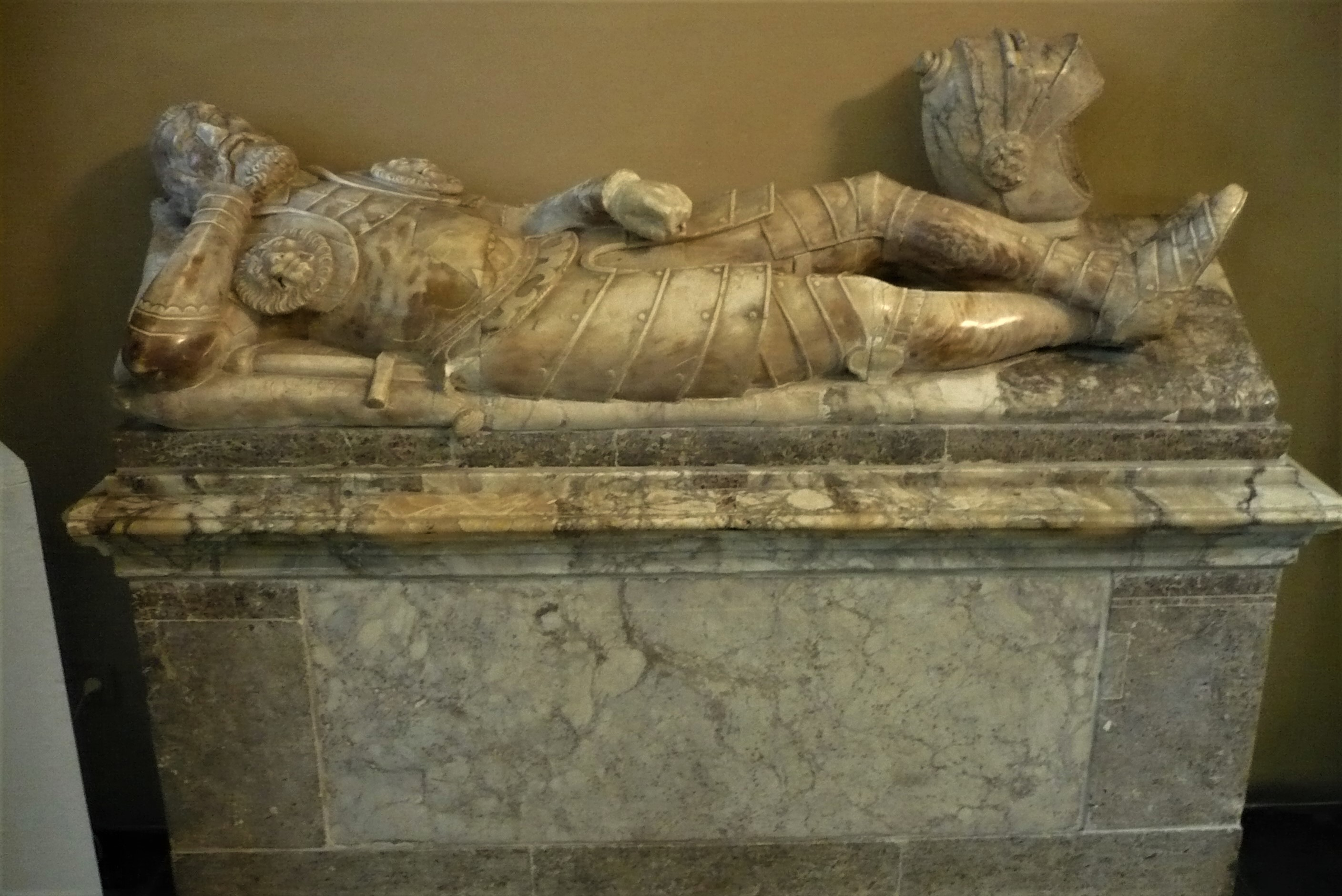 Klasztor dominikanów we Lwowie. Nagrobek